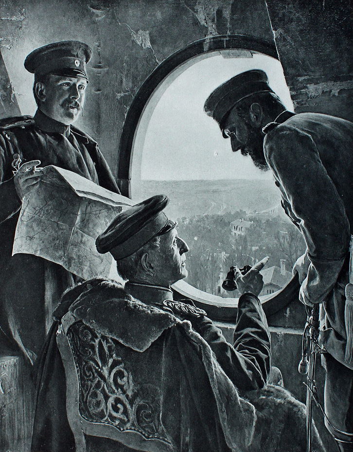 Ferdinand von Harrach (1832-1915): Generalfeldmarschall Graf von Moltke vor Paris. Heliogravüre des Gemäldes hergestellt um 1900 (Moltke mit seinen Adjutanten Henry von Burt und Otto von Claer)